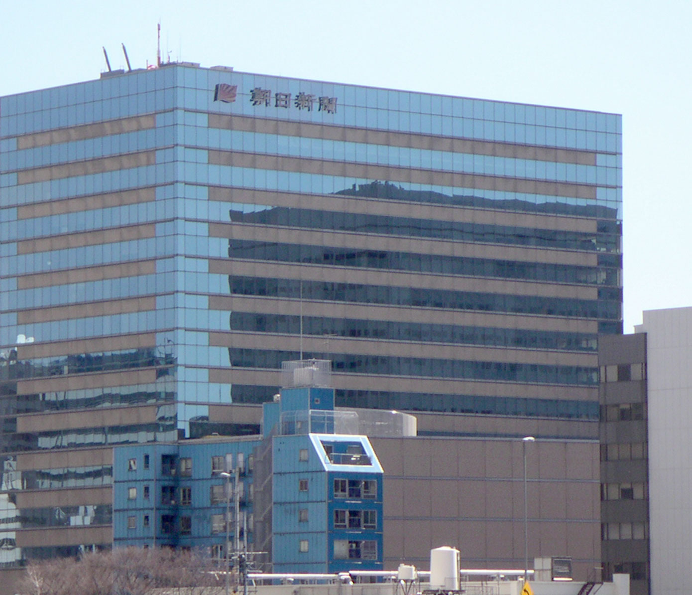 Asahi Shimbun Company Tokyo ja: 朝日新聞東京本社